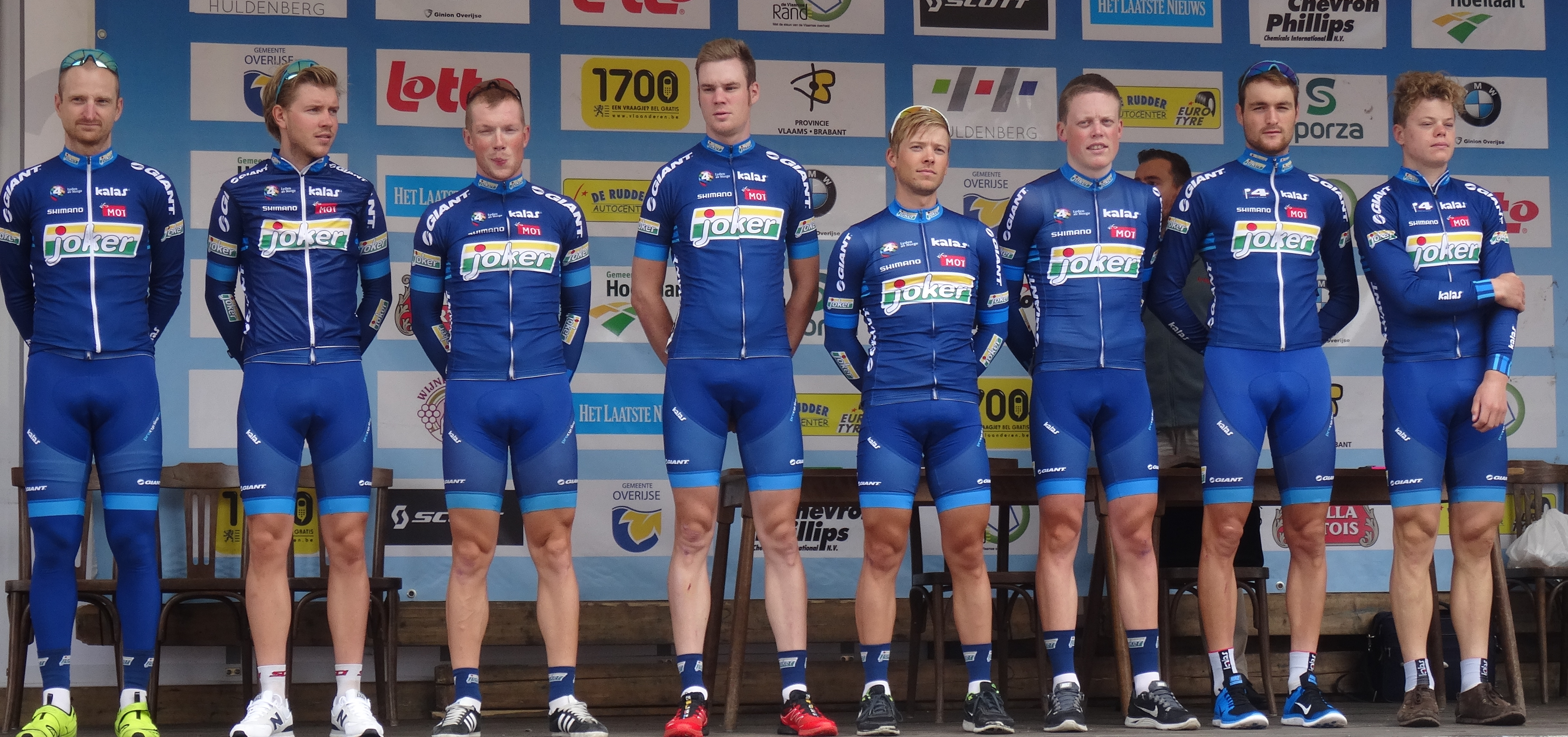 Reportage photographique réalisé le mercredi 27 août à l'occasion du départ de la Druivenkoers Overijse 2014 à Huldenberg, Belgique.